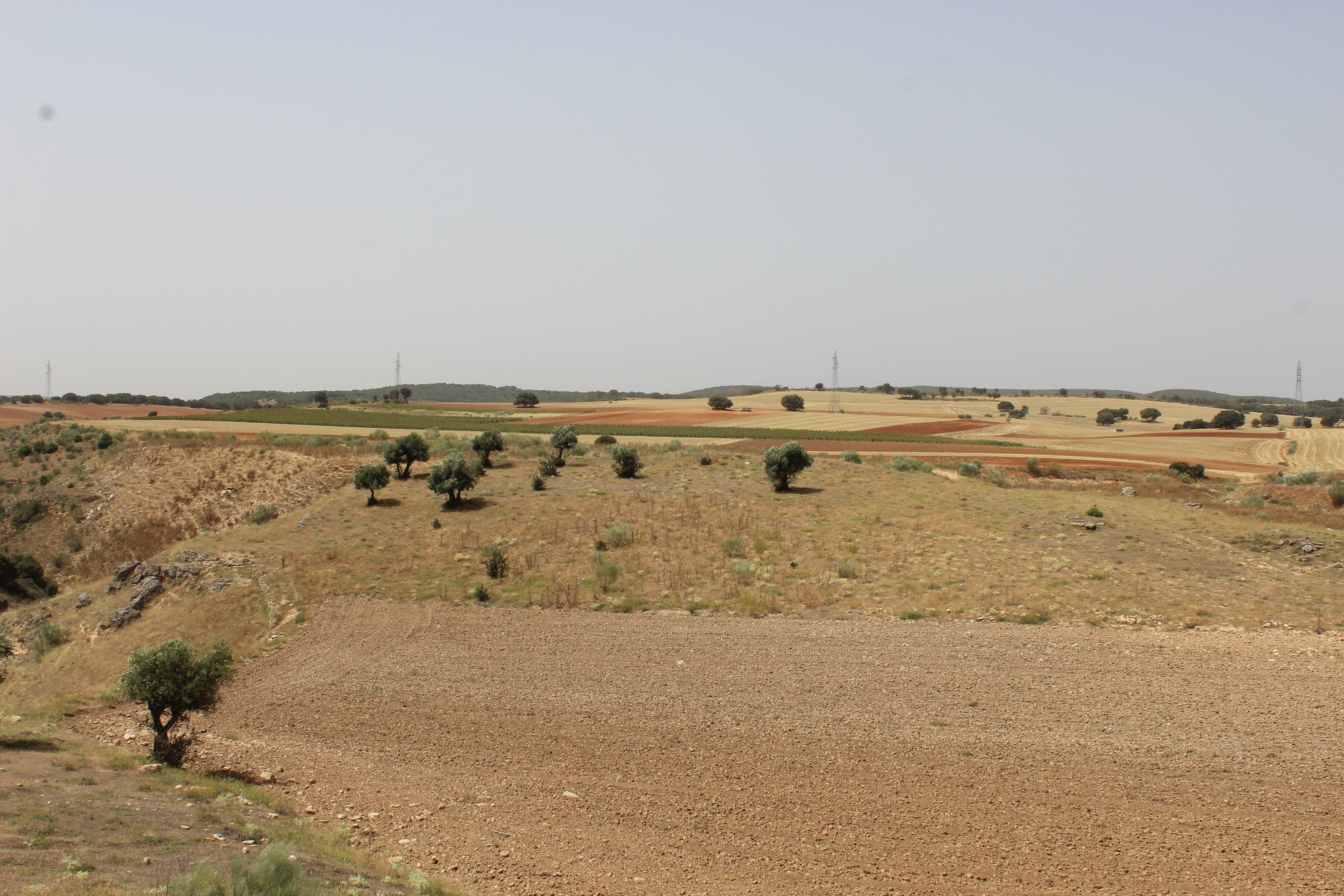 Monte en el término municipal de Humanes junto al Sorbe, provincia de Guadalajara. ¿Ubicación del Castillo de Peñahora?